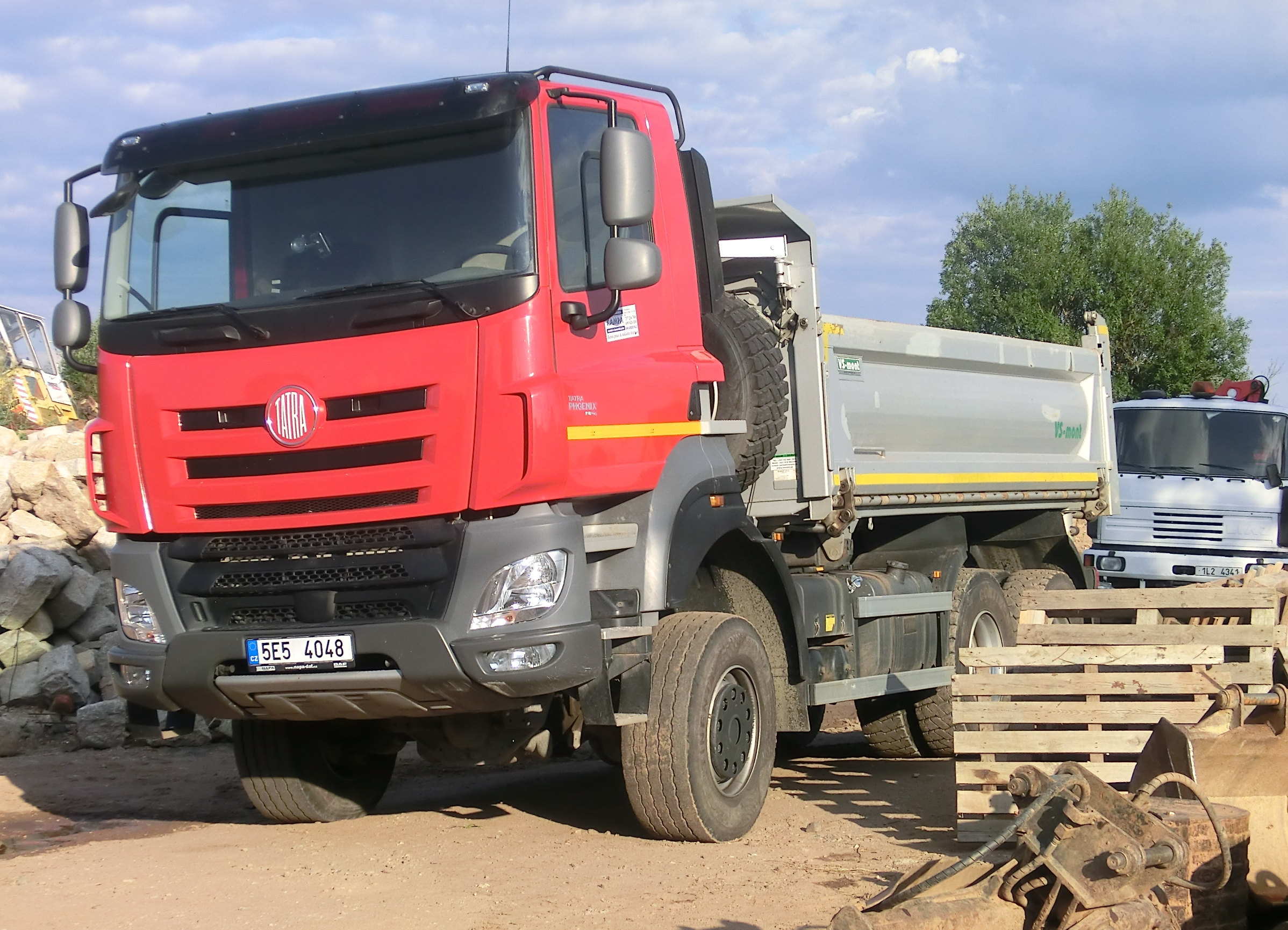 Sklápěč Tatra 158 Phoenix (po faceliftu 2015), v pozadí sklápěč LIAZ 19.33 SA (přestavěn z valníku 19.33 PB). Vlastník: stavební společnost KAMPA Marynka, Dolní Branná.